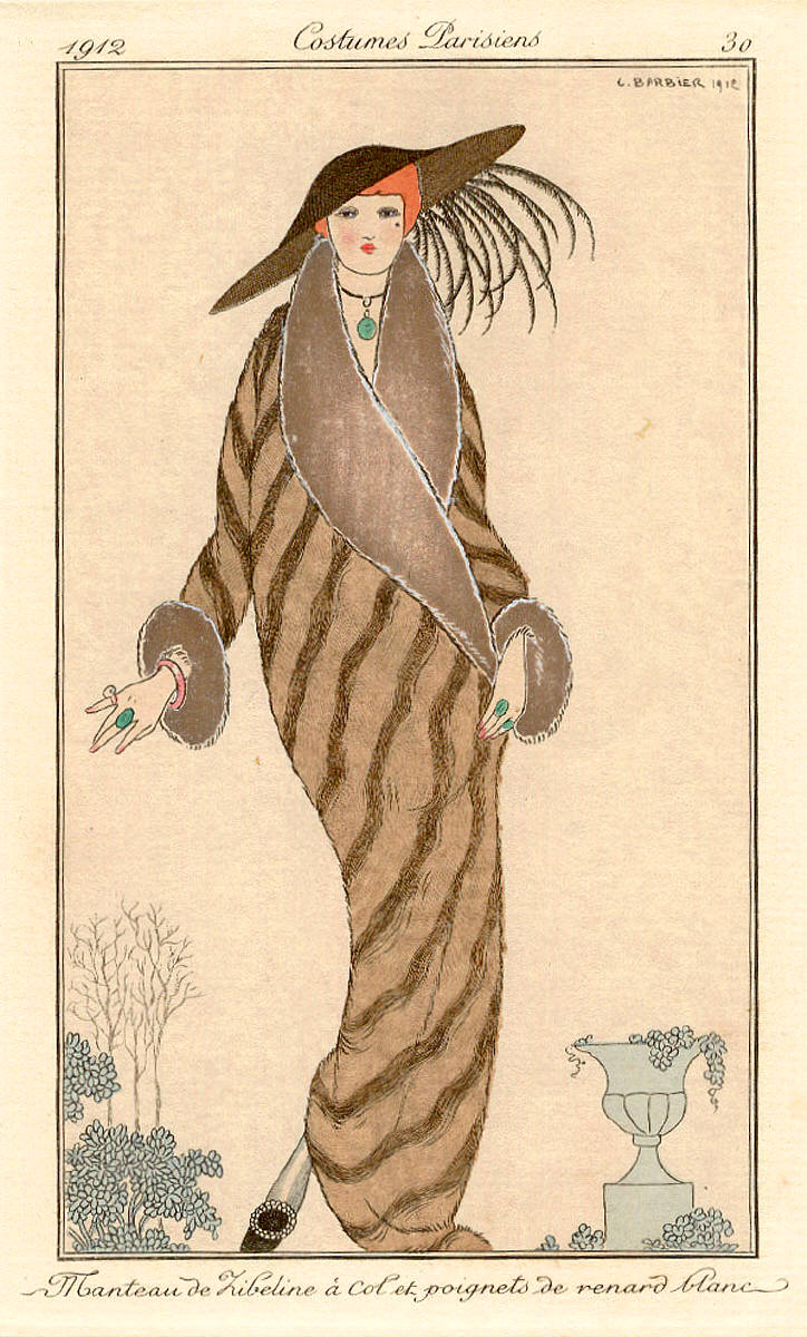 Costumes Parisiens Fashion illustration No.30, Journal des dames et des modes, 1912: Manteau de Zibeline